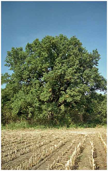 Památný dub u cesty z Přelouče do Semína